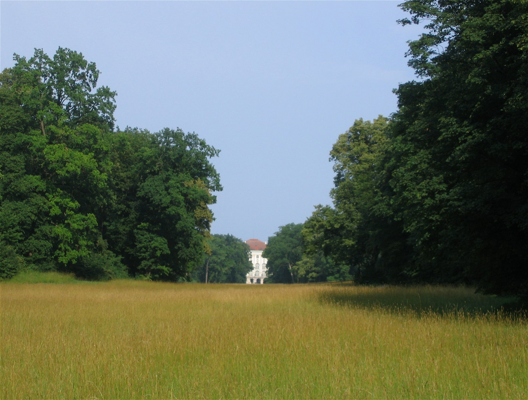 Schlosspark Nymphenburg in München, nördlicher Durchblick